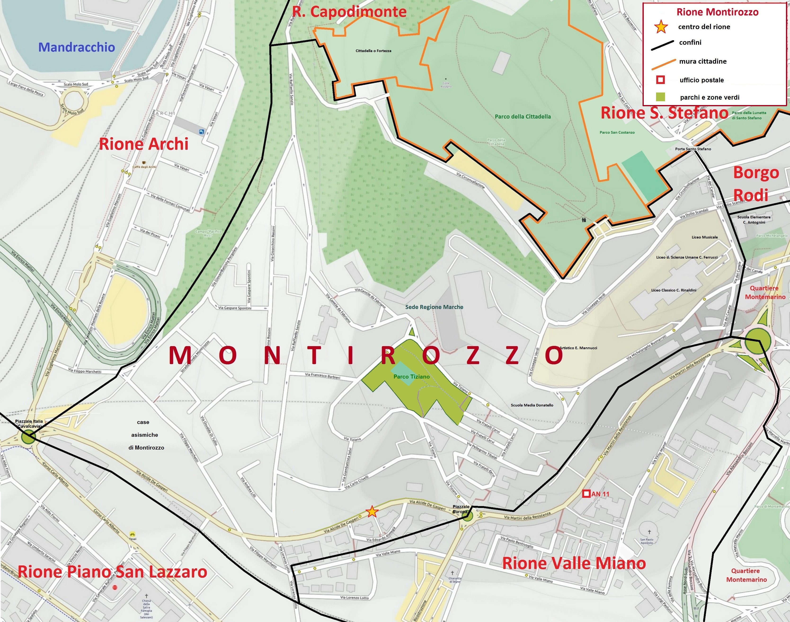 Mappa del Rione Montirozzo di Ancona, con i confini, le vie, le piazze e i parchi.